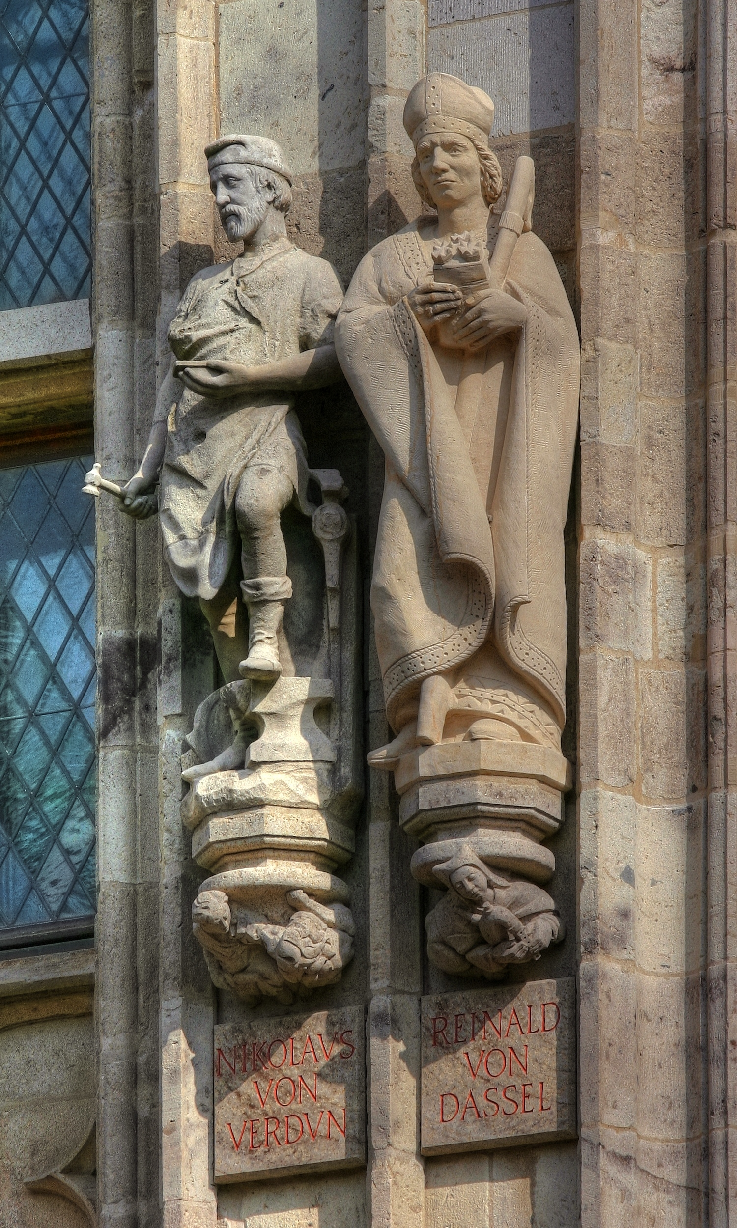 Rathausturm Köln mit den Figuren: Nikolaus von Verdun, Rainald von Dassel